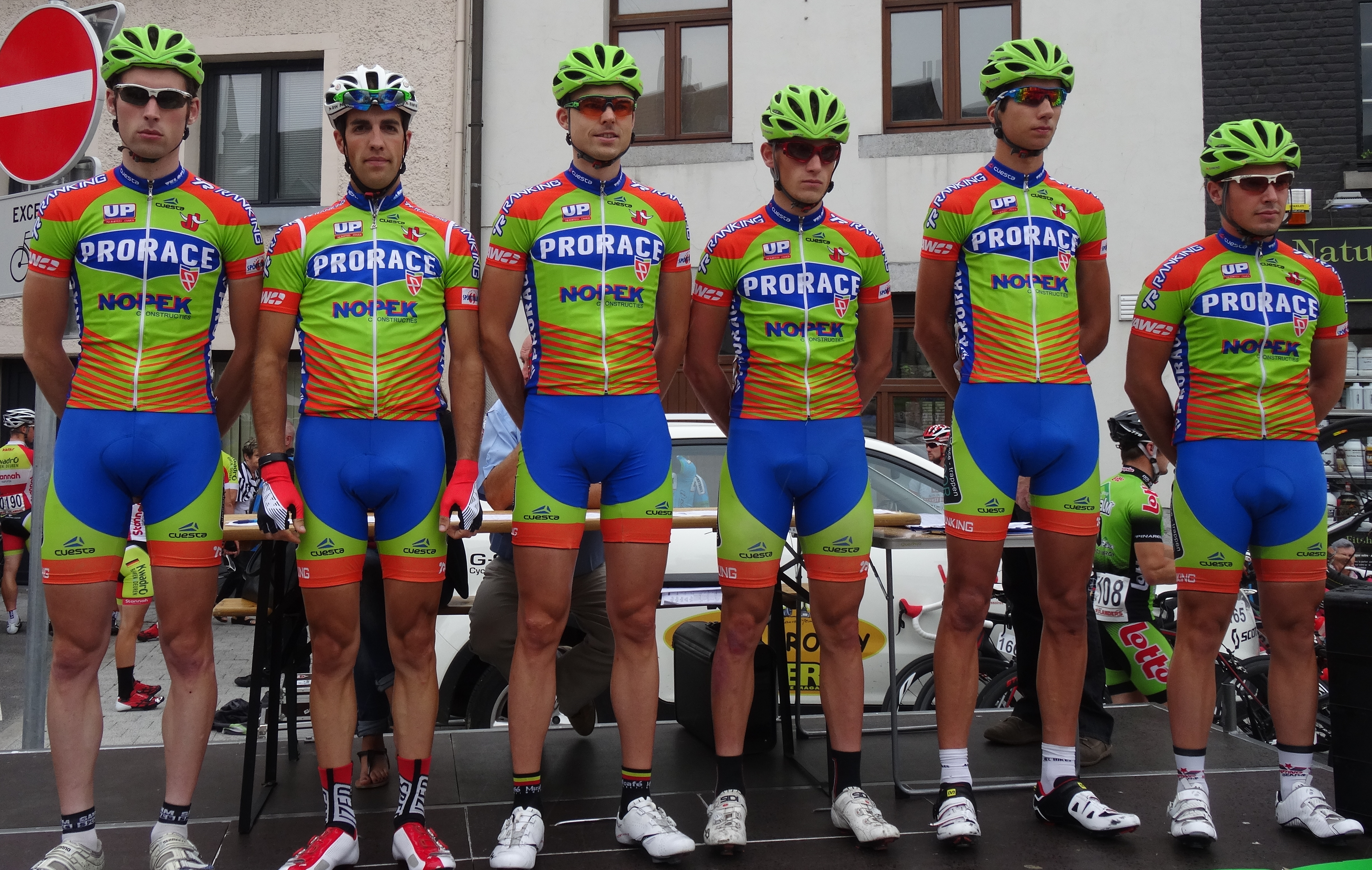 Reportage photographique réalisé le mercredi 6 août à l'occasion du départ de la première étape du Tour de la province de Namur 2014 à Jambes (Namur), Belgique.